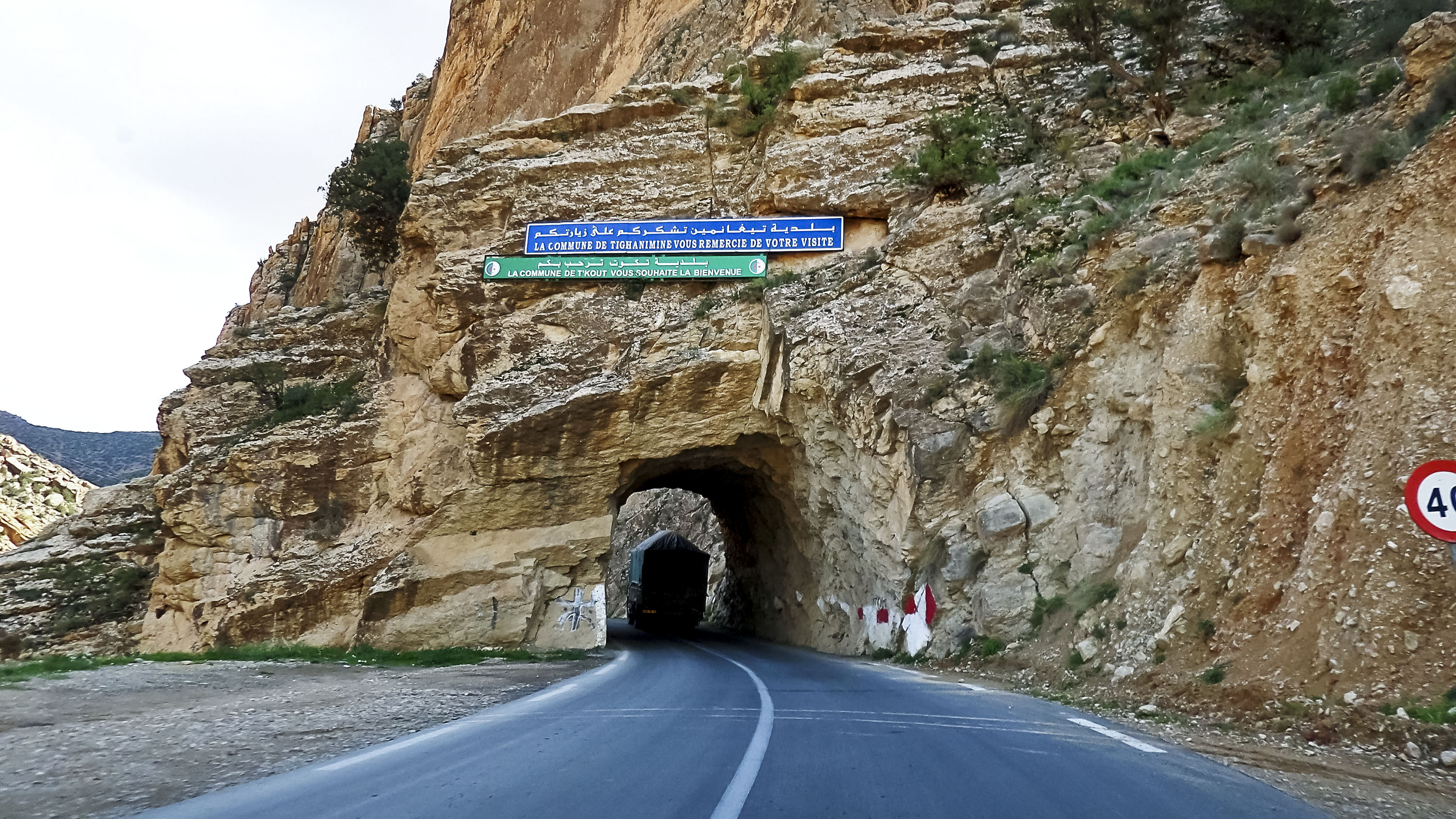 Frontières Tkout et Tighanimine, wilaya de Batna حدود تكوت و تيغانمين، ولاية باتنة